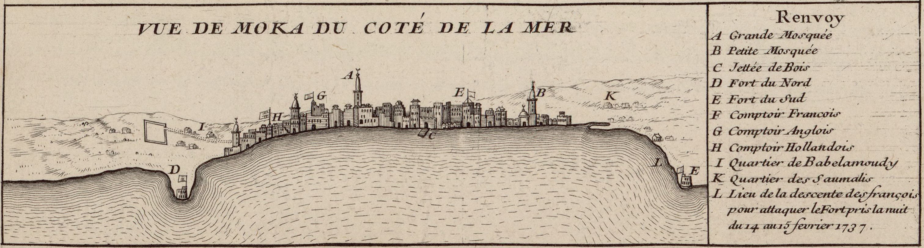 Titre exact : Vue de Moka du coté de la mer. Dessin publié en 1737 après un expédition militaire française contre ce port. Actuellement au Yemen.